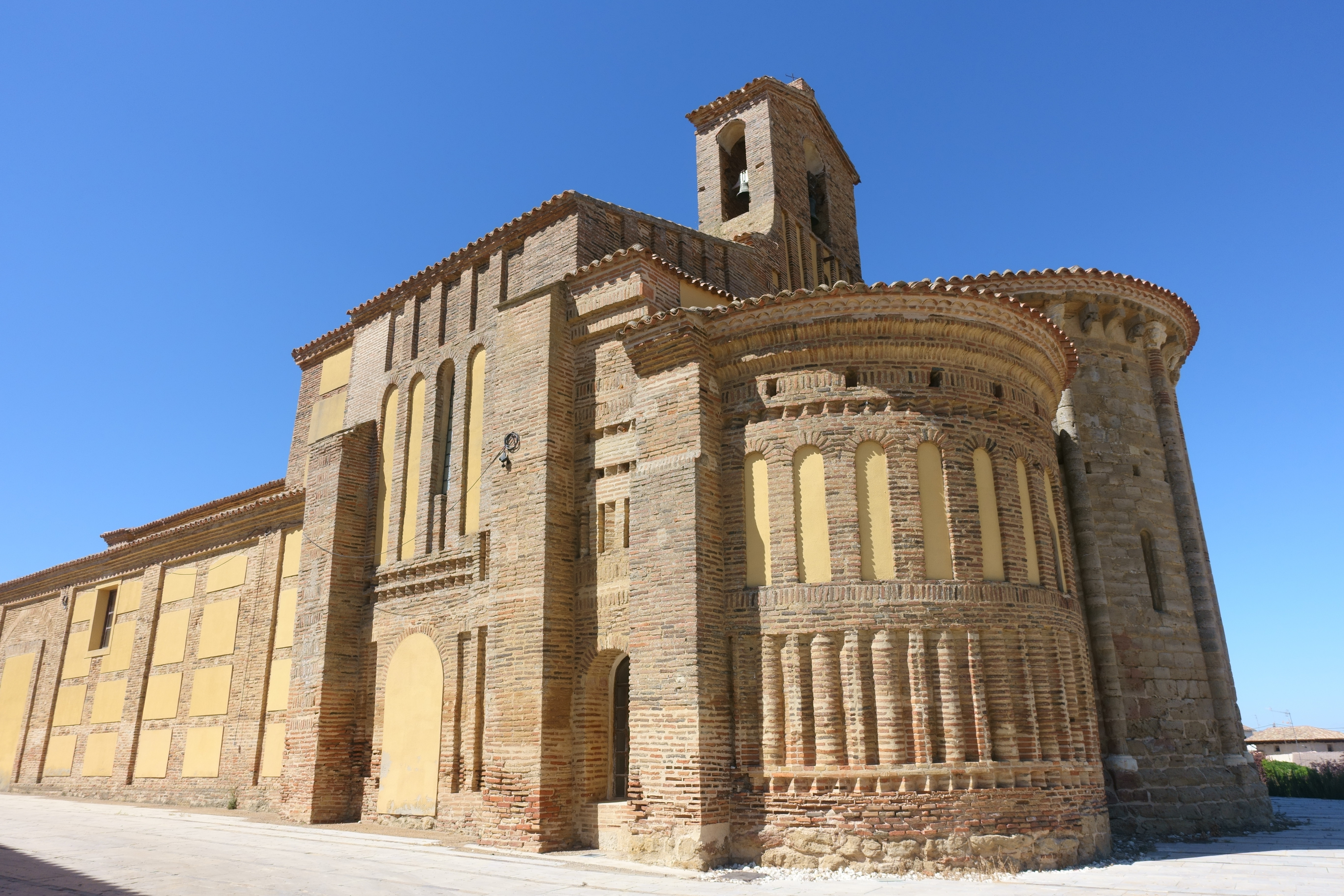 Iglesia de San Gervasio y San Protasio, Santervás de Campos (Valladolid, España).